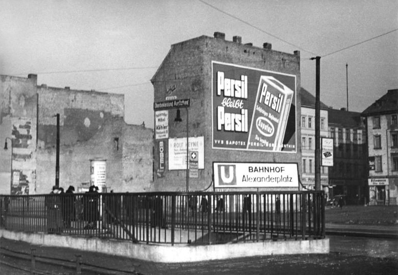 Illus-Funck Kno-Be. 12.2.51 Persil ist wieder da. Auf dem Alexanderplatz in Berlin wurde an einer Hauswand eine Reklamefläche angebracht, die auf das von der VVB Sapotex in alter Qualität herausgebrachte Waschmittel "Persil" hinweist."